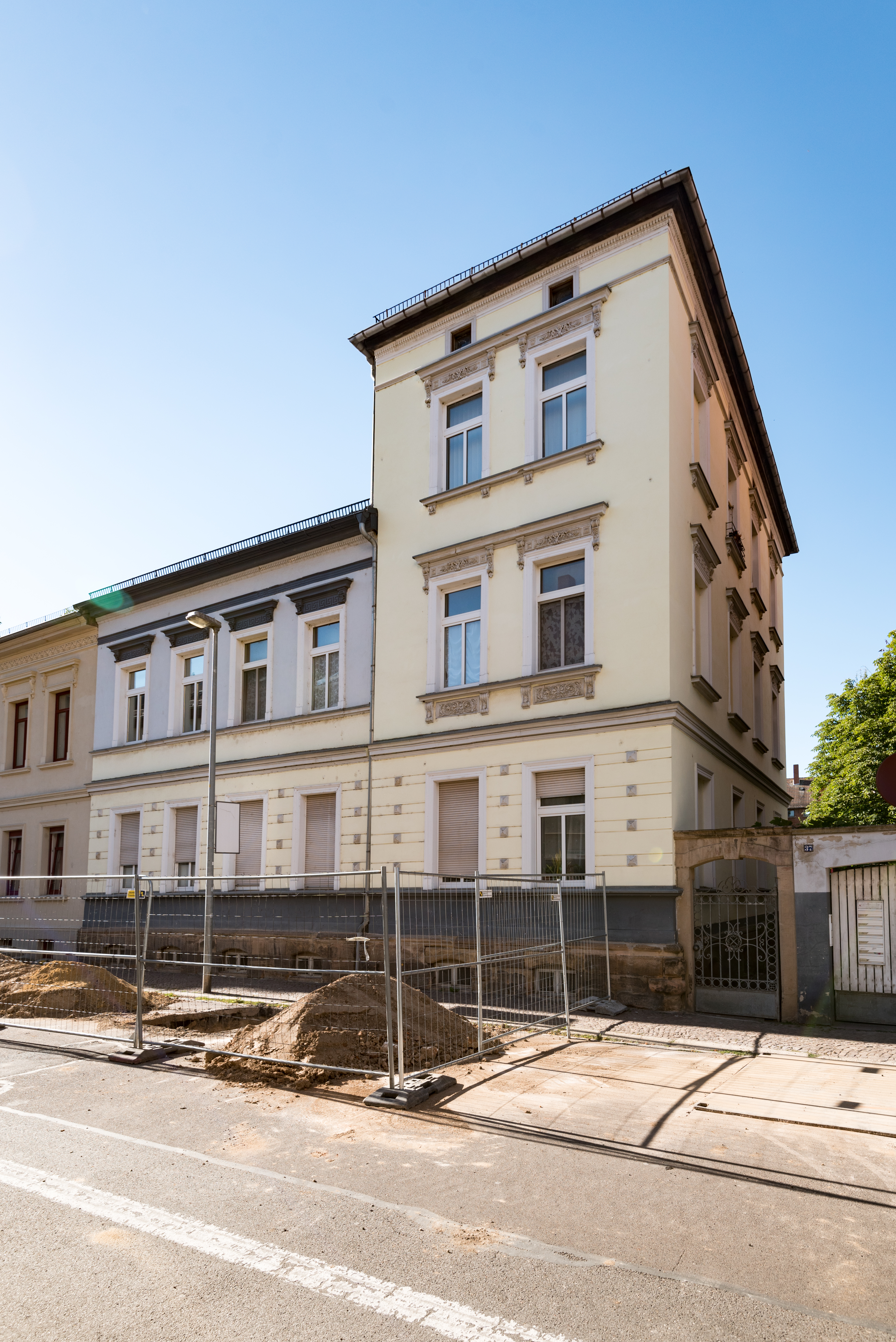 Weißenfels, Beuditzstraße 37